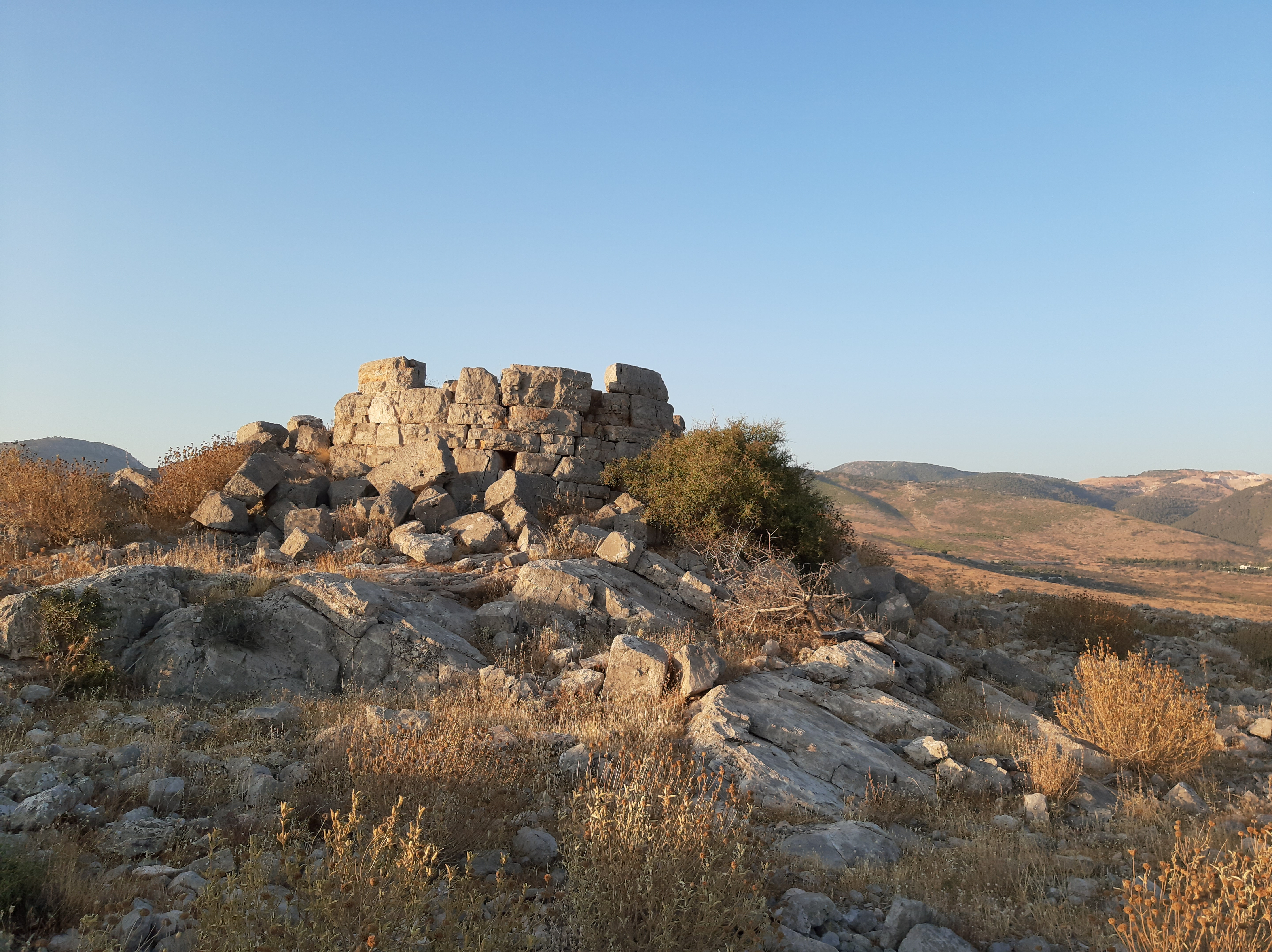 Άποψη του Φρουρίου Πλακωτό στη Μαγούλα Αττικής